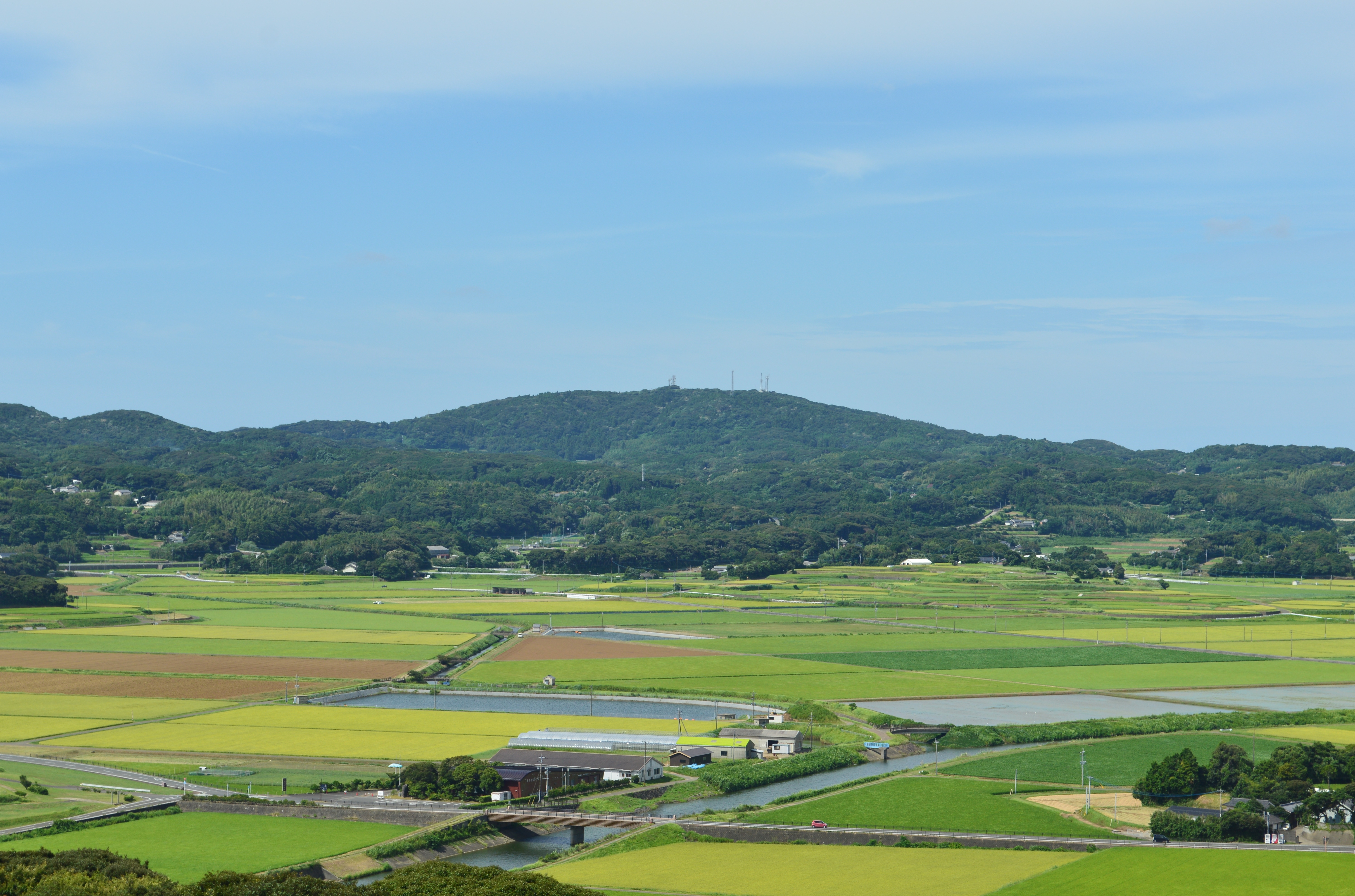 岳ノ辻 遠景